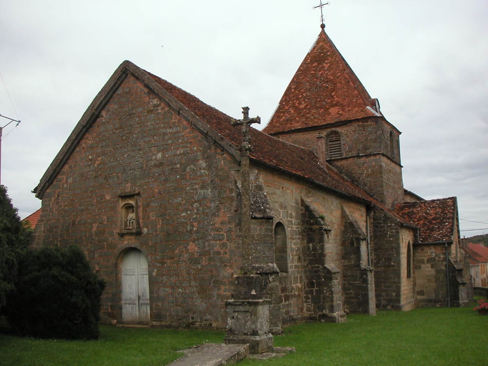 L'église de Chauvirey-le-Châtel